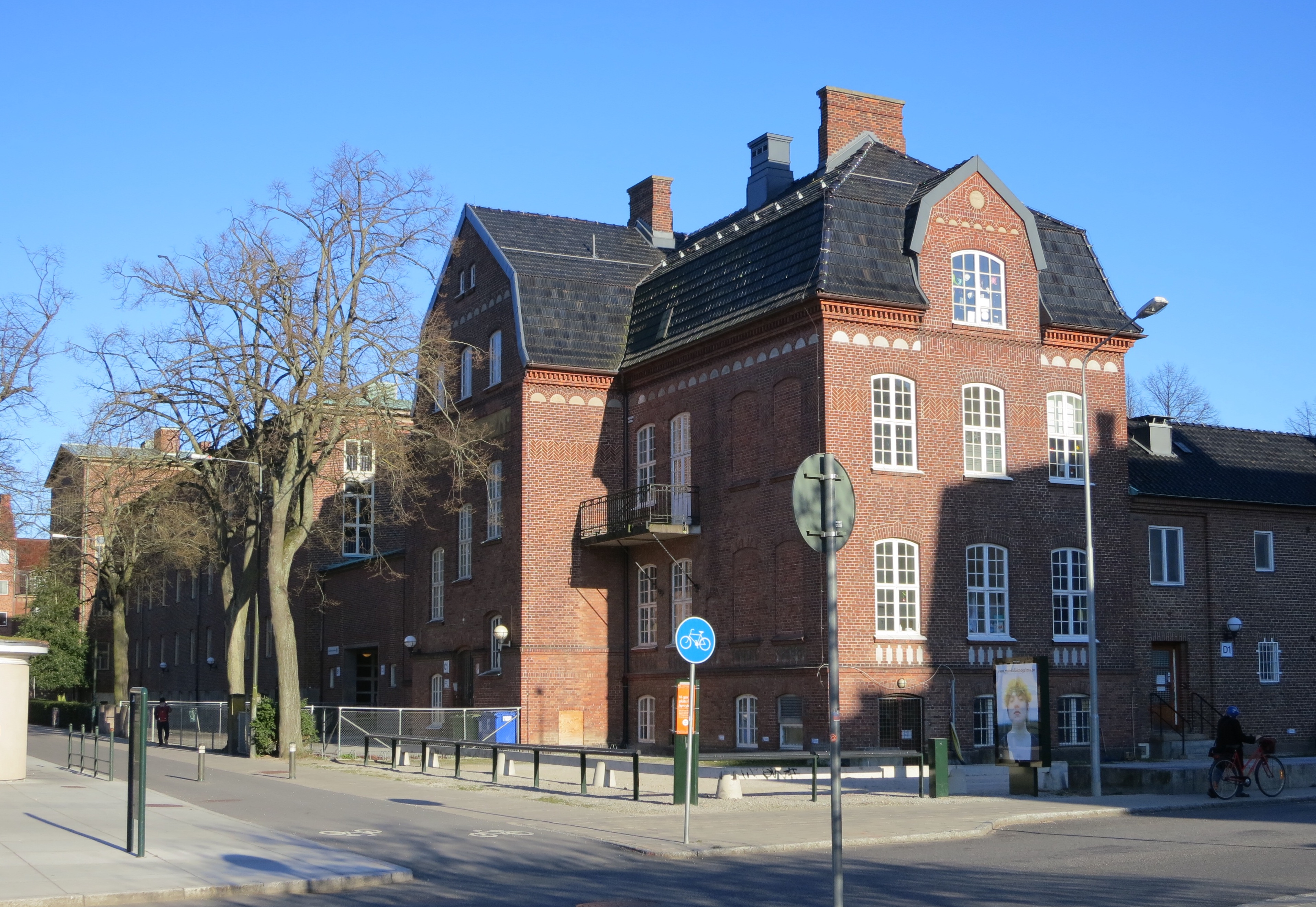 Källängsskolan, Malmö